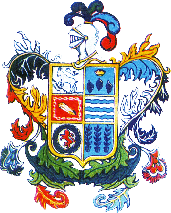 Ilustración del Escudo de Armas usado por la familia Cabrera en el Siglo XVI. Actualmente es el escudo de la ciudad de Ica.